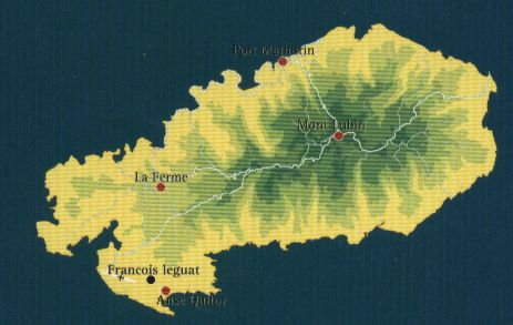 Site map of François Leguat Giant Tortoise and Cave Reserve